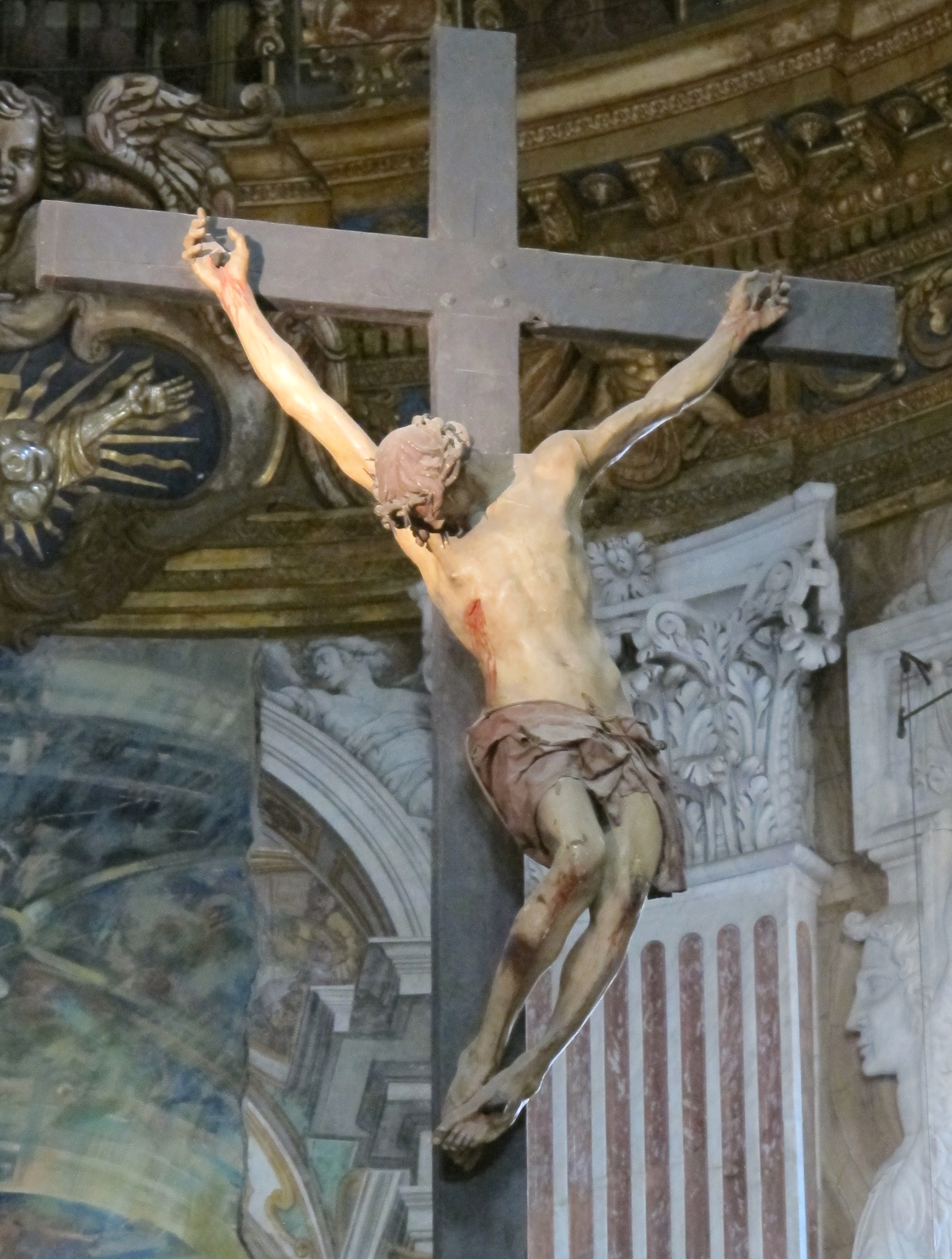 Genova, Liguria